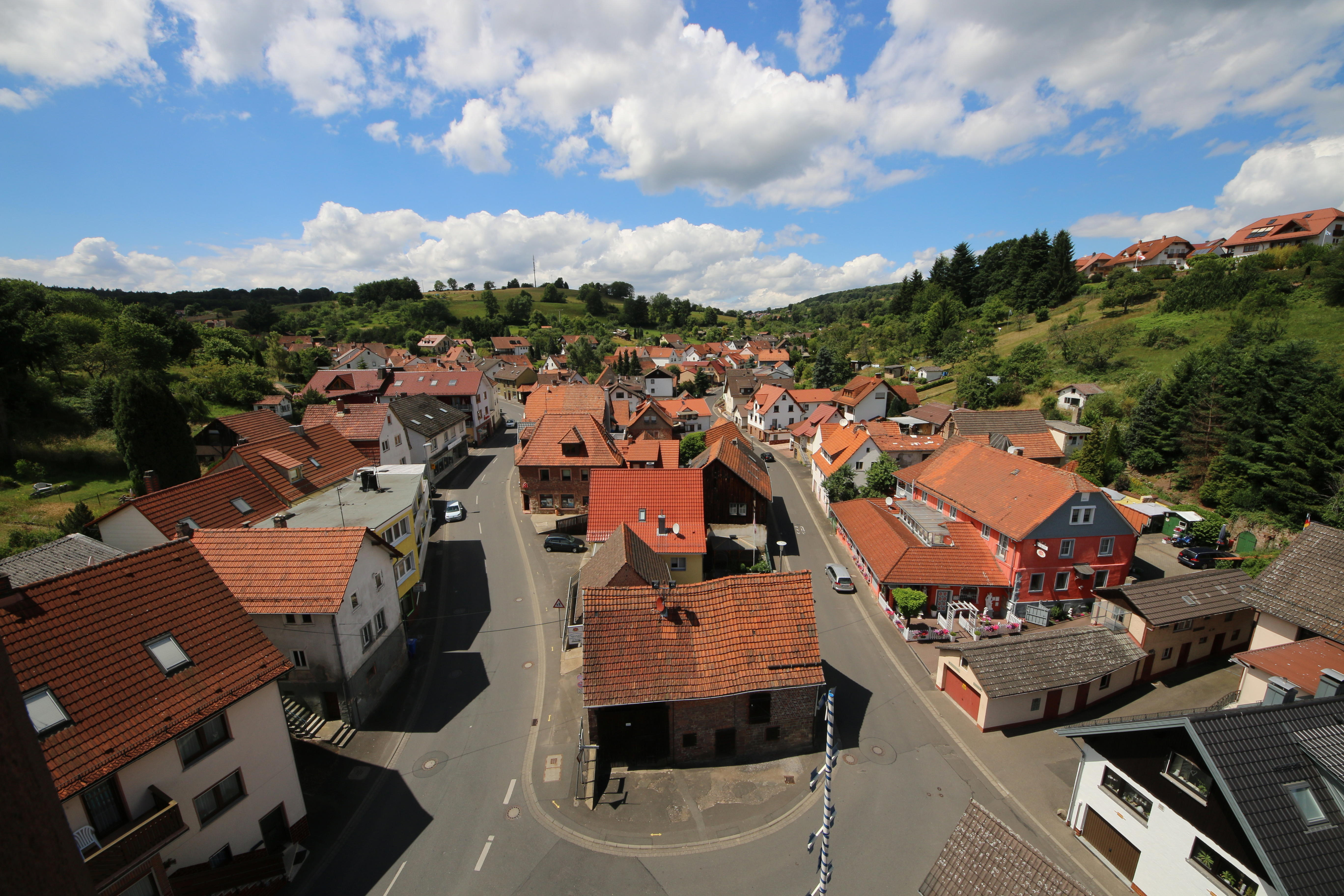 Blick vom Kirchturm auf den Weibersbrunner Ortskern 2014